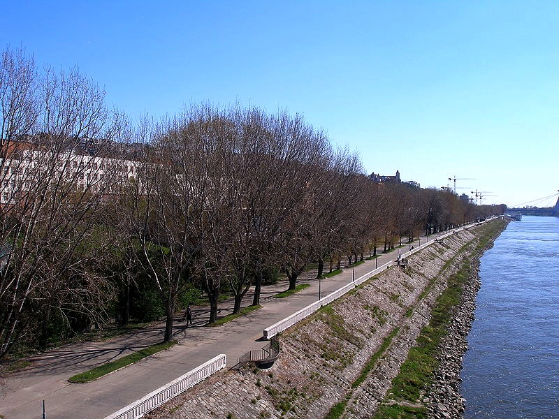 Dunajské nábrežie v Bratislave. Vľavo areál Fakulty športu Komenského univerzity v Bratislave.